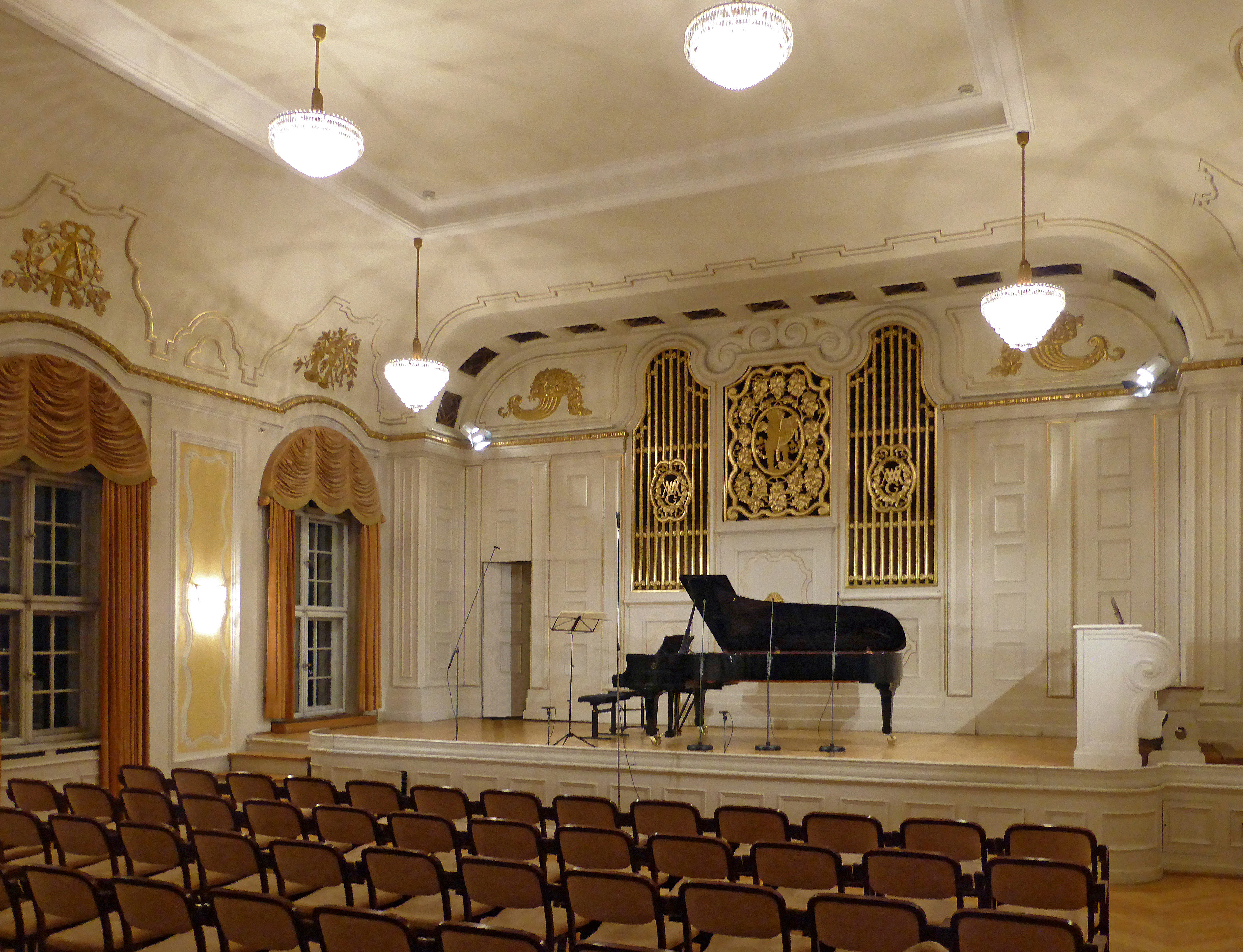 Internationale Stiftung Mozarteum, Schwarzstraße 26, Salzburg - Wiener Saal.